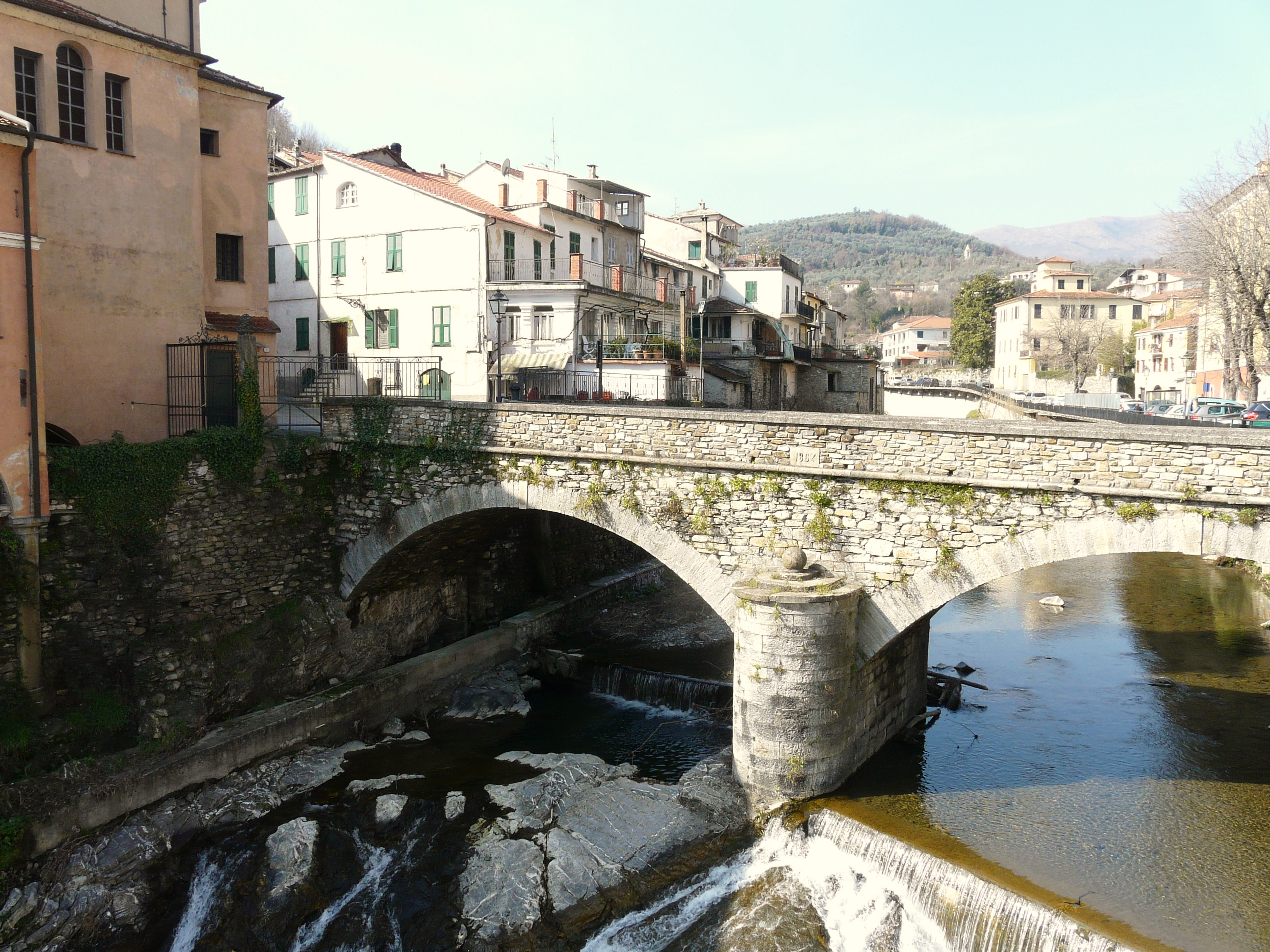 Ponte, Borgomaro, Liguria, Italia